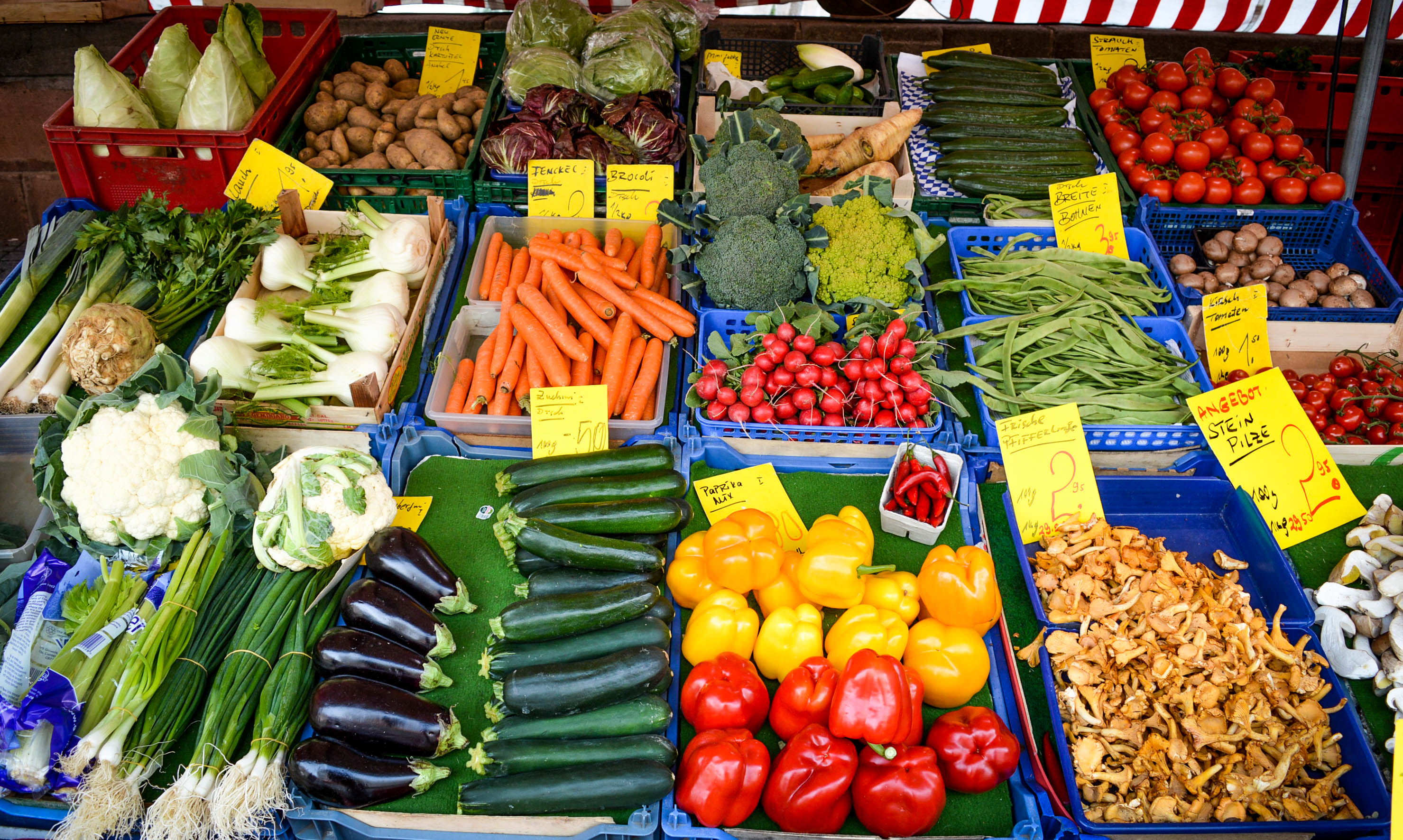 Angebot an verschiedenem Gemüse und Speisepilzen (rechts) an einem Marktstand in Nürnberg, Deutschland.